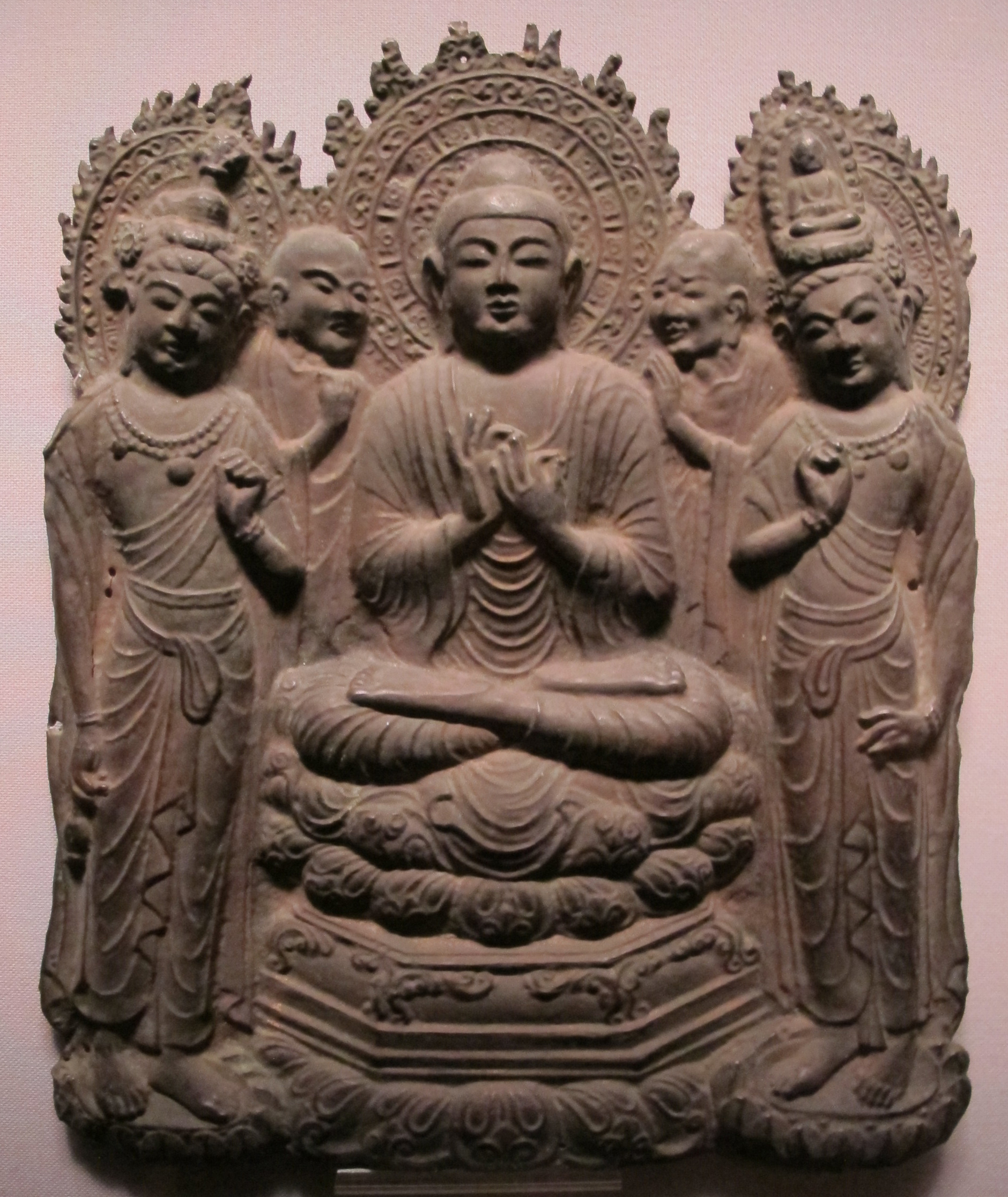 Periodo asuka, amida, VII sec